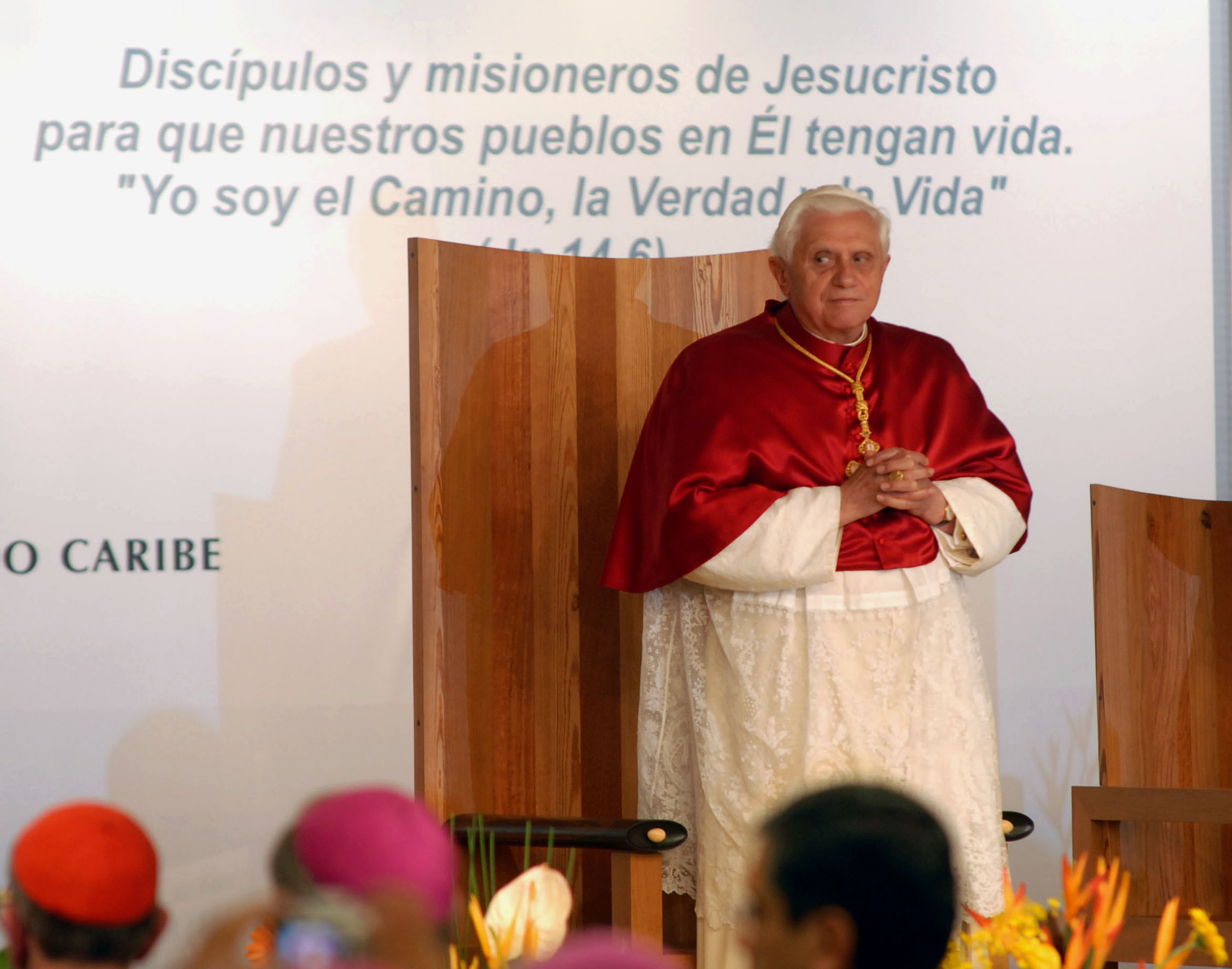 Papa Bento XVI faz a abertura solene da Quinta Conferência Geral do Episcopado Latino-americano e Caribenho, em Aparecida, interior do estado de São Paulo, Brasil.